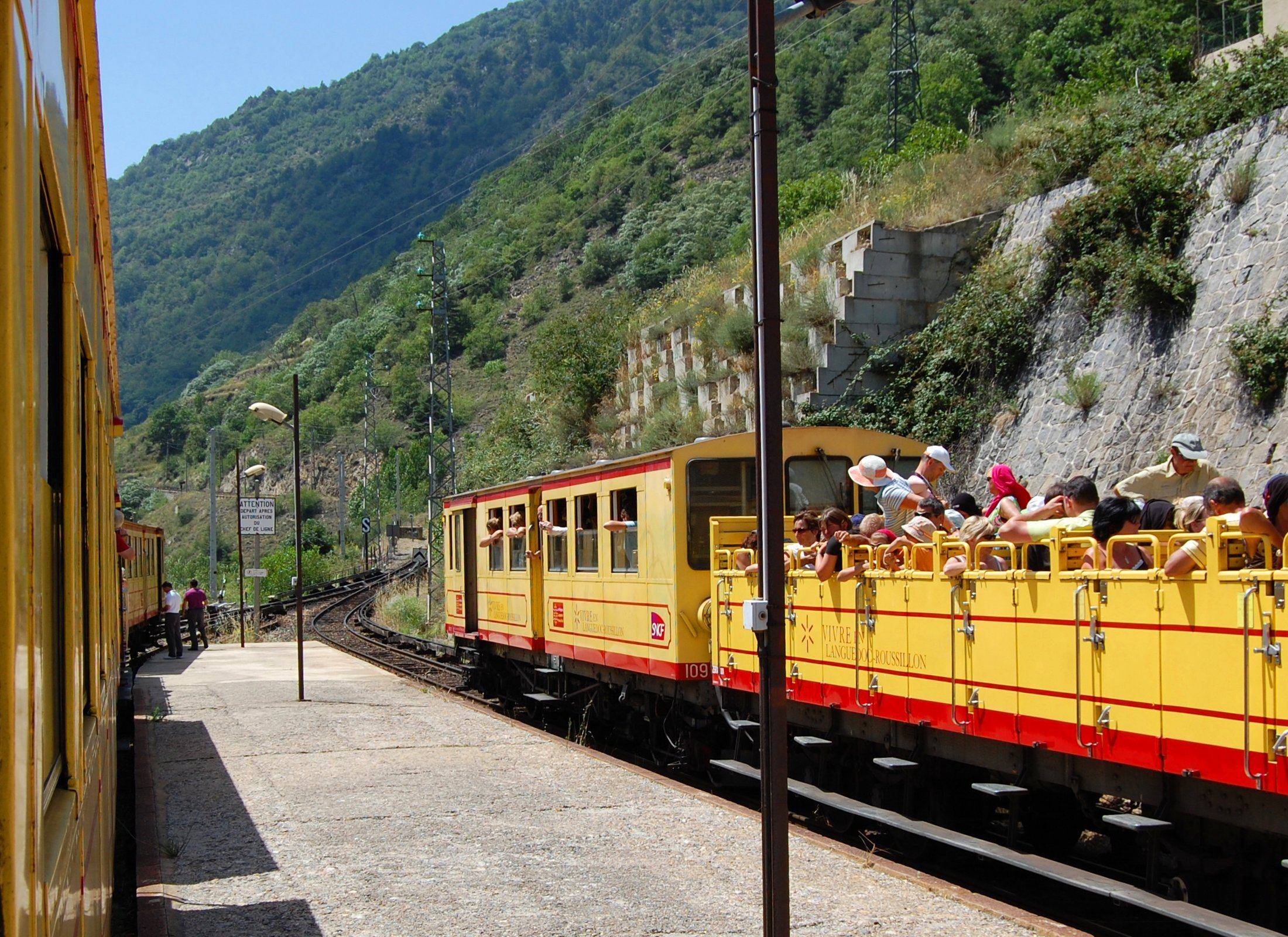 Train jaune croisement (visages floutés)